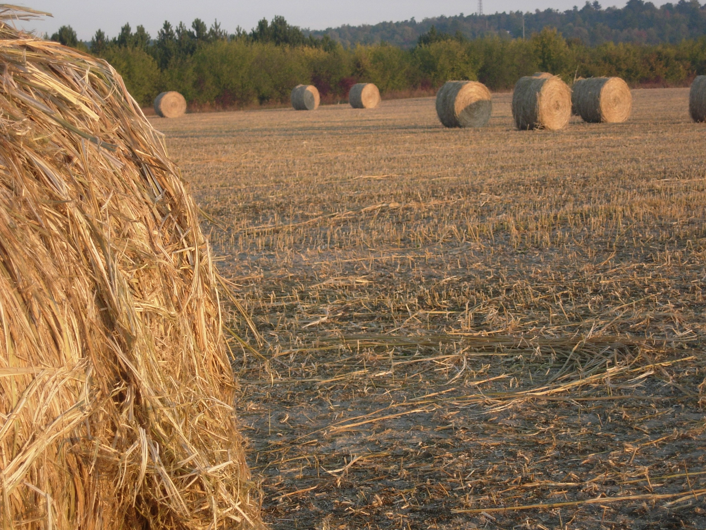 Culture du chanvre dans l'Aube (Champagne-Ardenne, France).